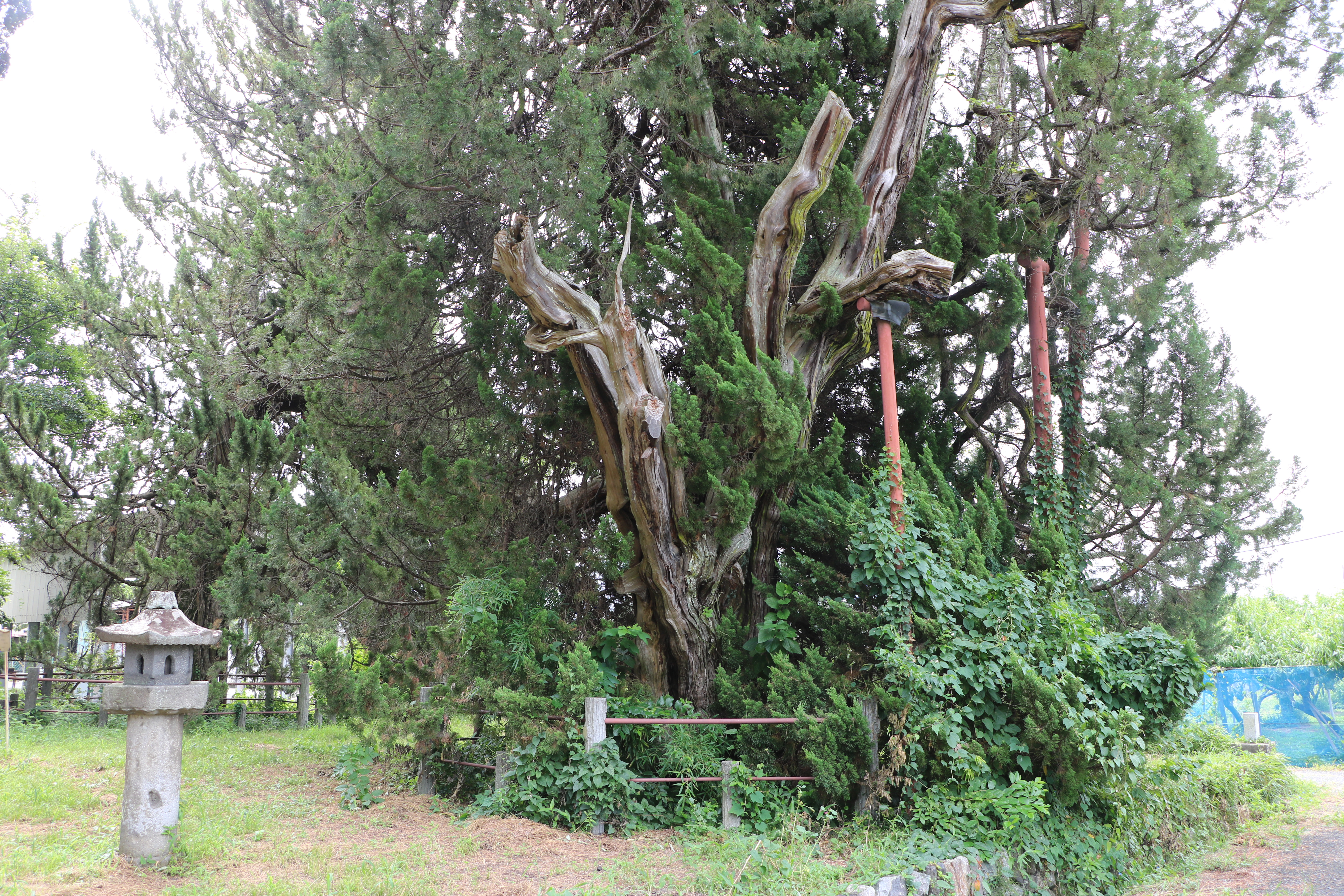 古長禅寺のビャクシンの南西隅の木（国指定天然記念物、山梨県南アルプス市）